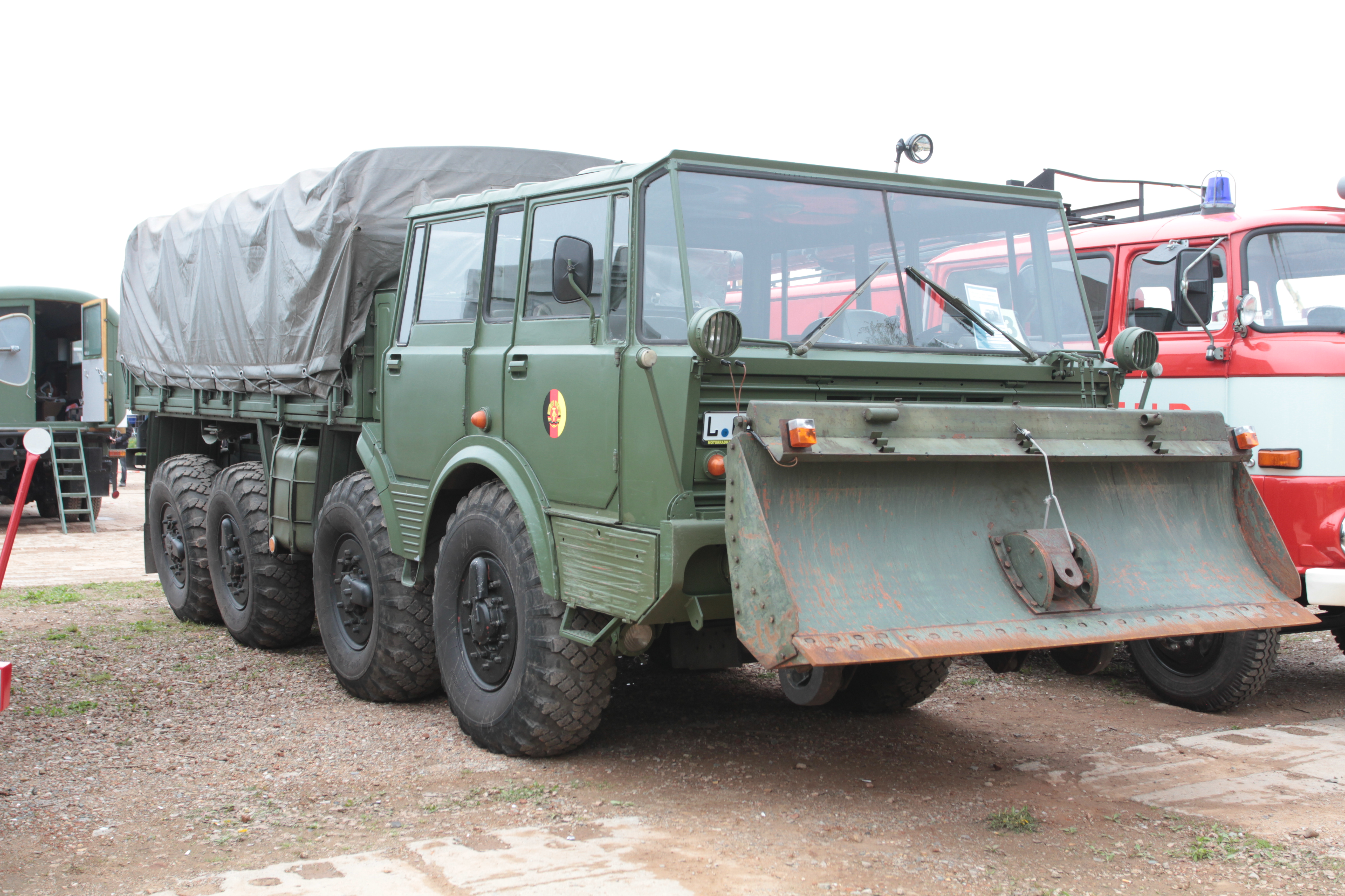 Tatra 813 beim 16. IFA Oldtimertreffen Werdau 2013